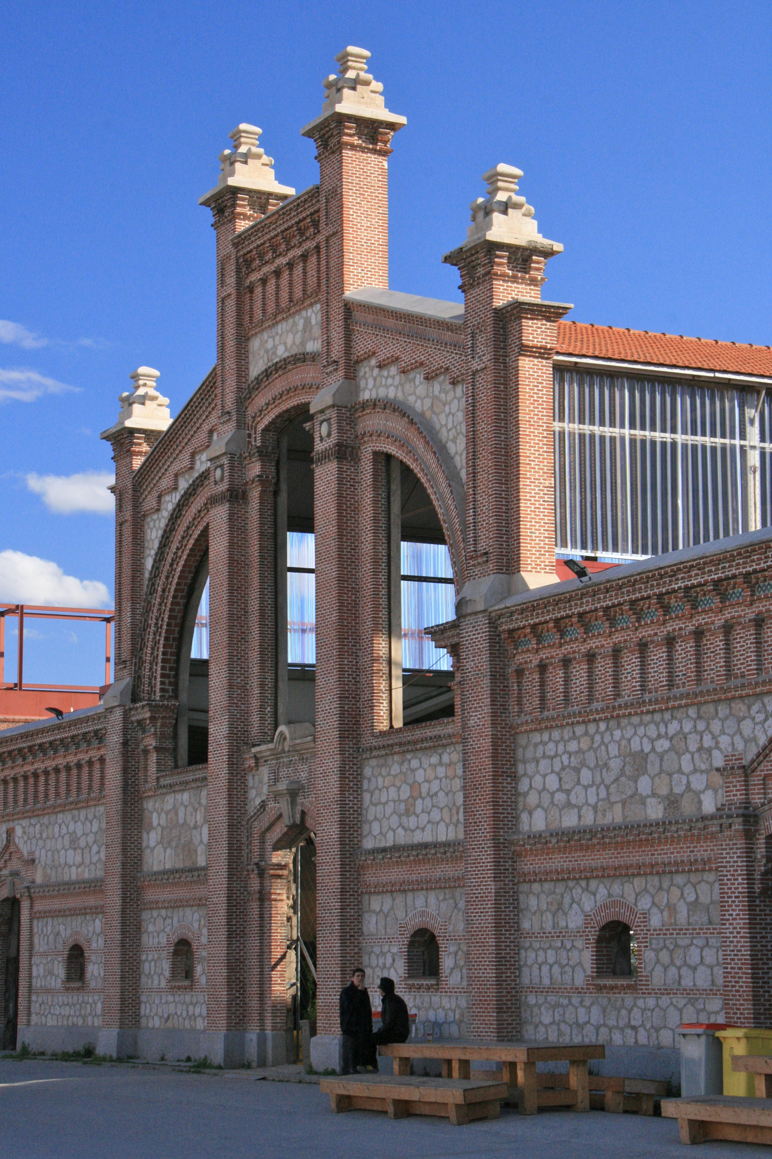 Estabulación - Vacuno